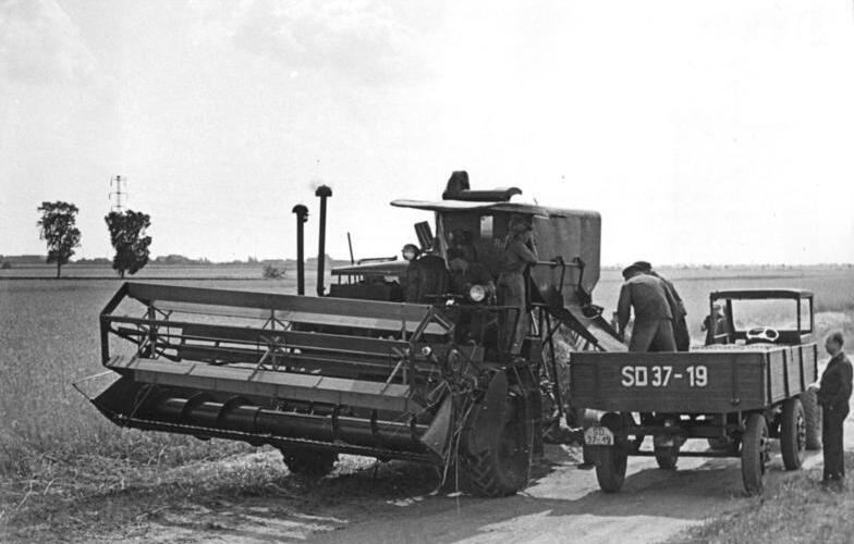 Schenkenberg, Ernte, Abladen des Getreides Zentralbild Illner 21.7.1953 Erntezeit bei der LPG "7. Oktober" in Schenkenberg, Kreis Delitzsch Mit grossem Arbeitseifer sind die Genossenschaftsbauern der Produktionsgenossenschaft "7. Oktober" in Schenkenberg, unterstützt durch die MTS Döbernitz, mit dem Einbringen der Roggenernte beschäftigt. Alle Arbeitsgänge sind mechanisiert und werden nach dem sowjetischen Fließsystem durchgeführt. Das heisst, ohne Unterbrechung mäht und drischt der "Stalinez 4", werden die Körner abgefahren, das Stroh gepreßt, die Felder nachts geschält und am anderen Morgen die Zwischenfrucht gedrillt. UBz: Der Bunker des "Stalinez 4", der bei jedesmaliger Fahrt um das Feld 25 - 30 Ztr. Roggen gedroschen hat, wird geleert. Sobald der Lastwagen mit Anhänger gefüllt ist, wird er sofort in die Kreisstadt zur VEAB gefahren, und ein neuer Lastwagen steht zur Aufnahme der Körner bereit.